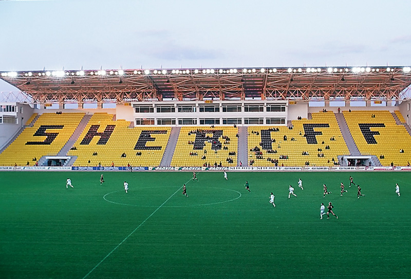 Stadion von Șerif Tiraspol in Transnistrien/Moldawien